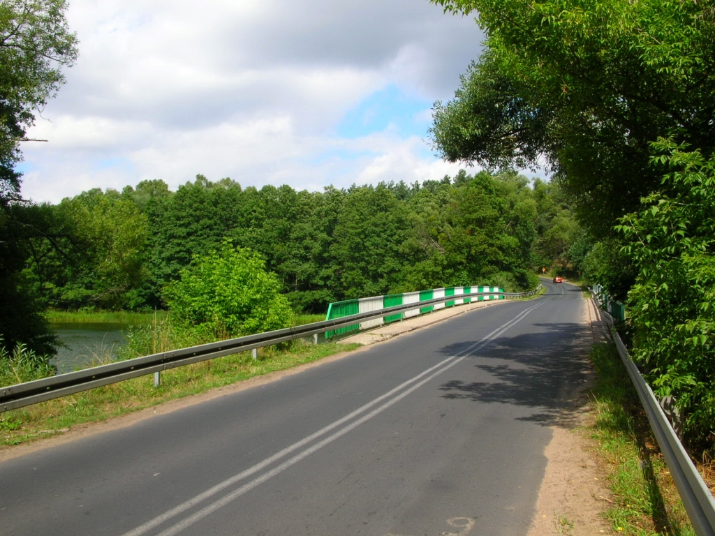 Most na Brdzie w Bydgoszczy-Janowie (Bożenkowie)